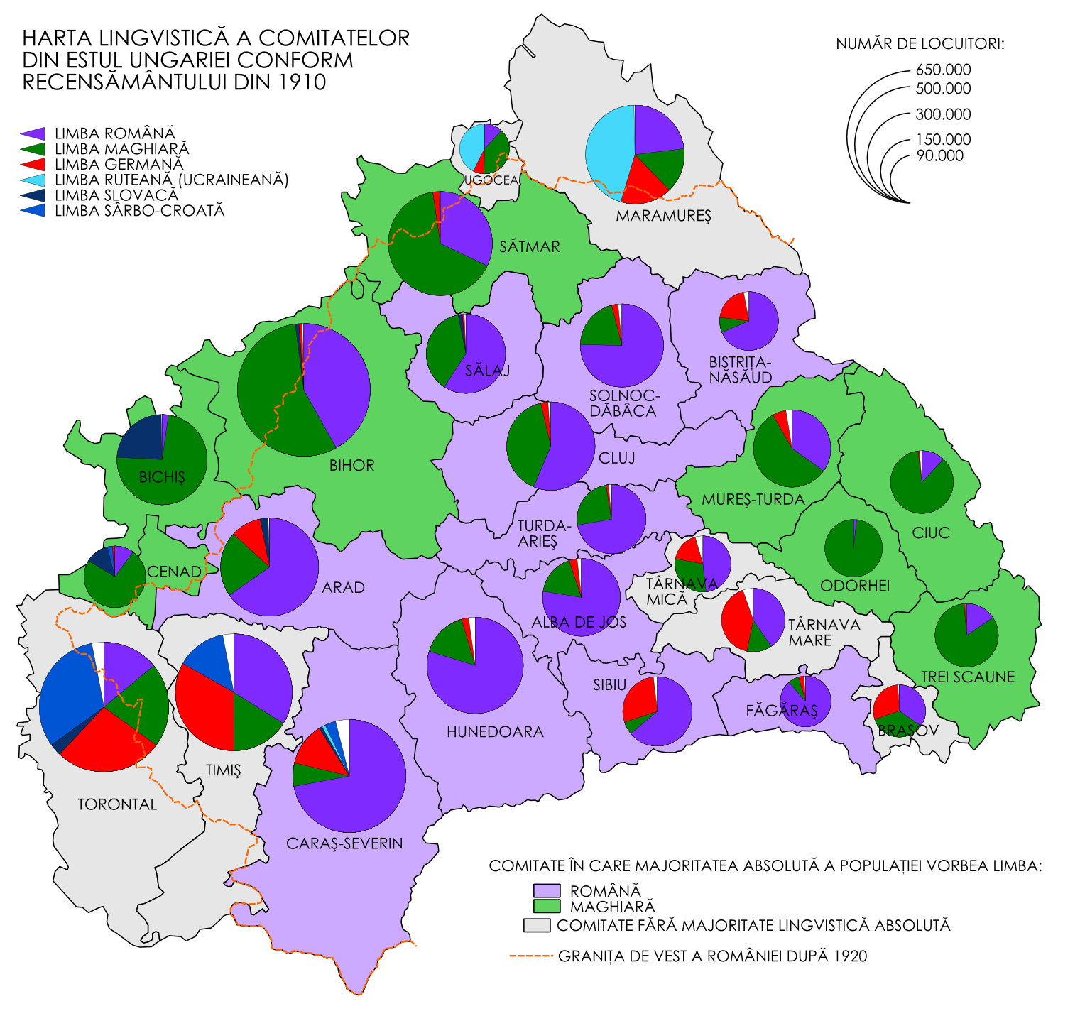 Harta lingvistica a Ungariei de Est in 1910